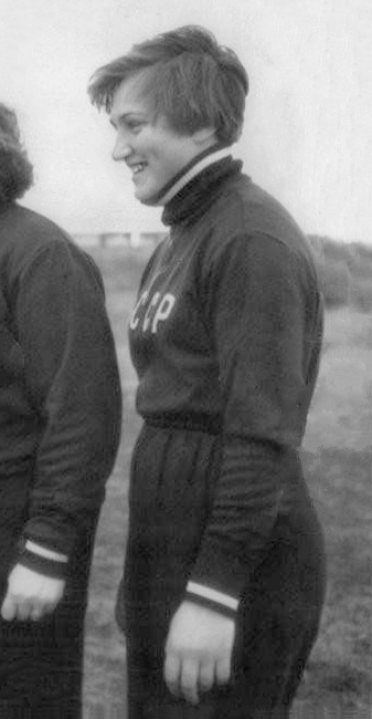 1956 PRESS PHOTO DANA ZATOPEK WIFE CZECH RUNNER EMIL ZATOPEK OLYMPIC JAVELIN